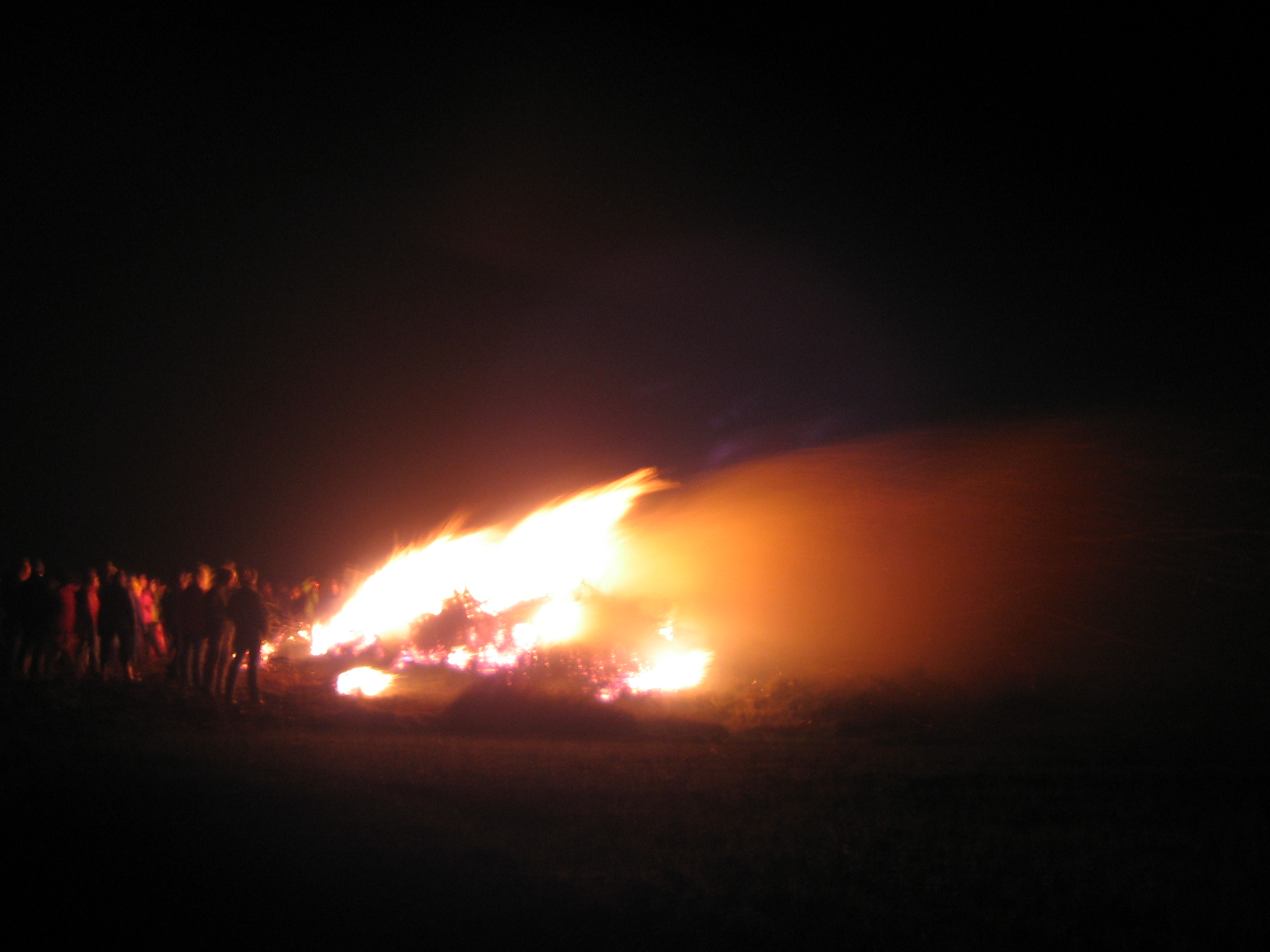 Biikebrennen near Risum-Lindholm; (Biikebrennen (in German), Biikebrånen (in North Frisian) or Pers Awten (in Danish))Biikebrånen